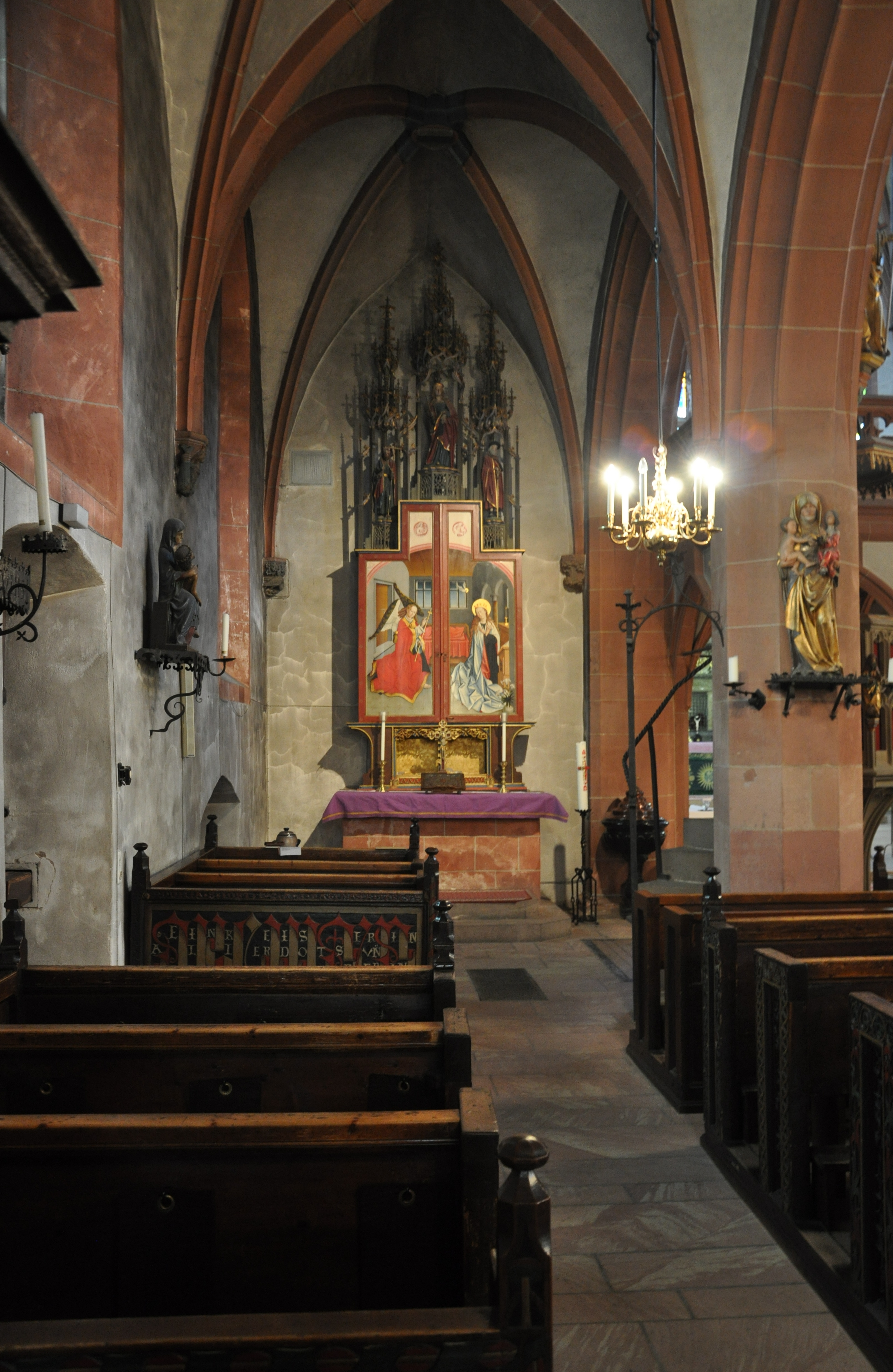 Kiedrich, Pfarrkirche St. Valentin, Nördliches Seitenschiff mit Johannesaltar (geschlossen; Altar des 15. Jh.; Flügel von F. A. Martin 1862)